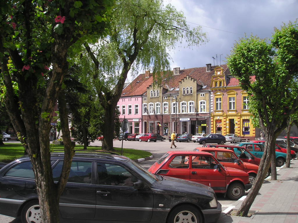 Plac Hallera, Lidzbark 27.05.2006